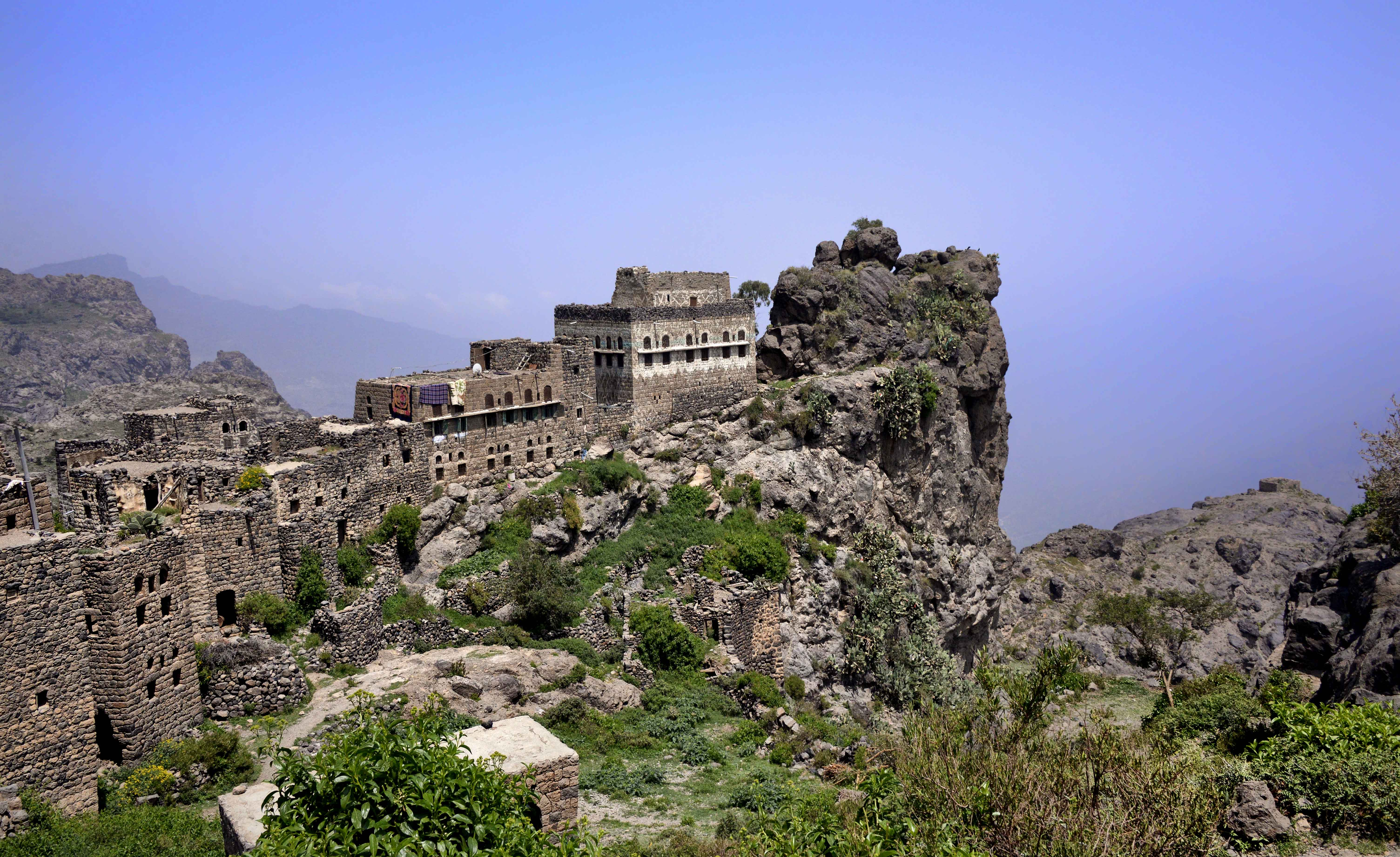 Yemen